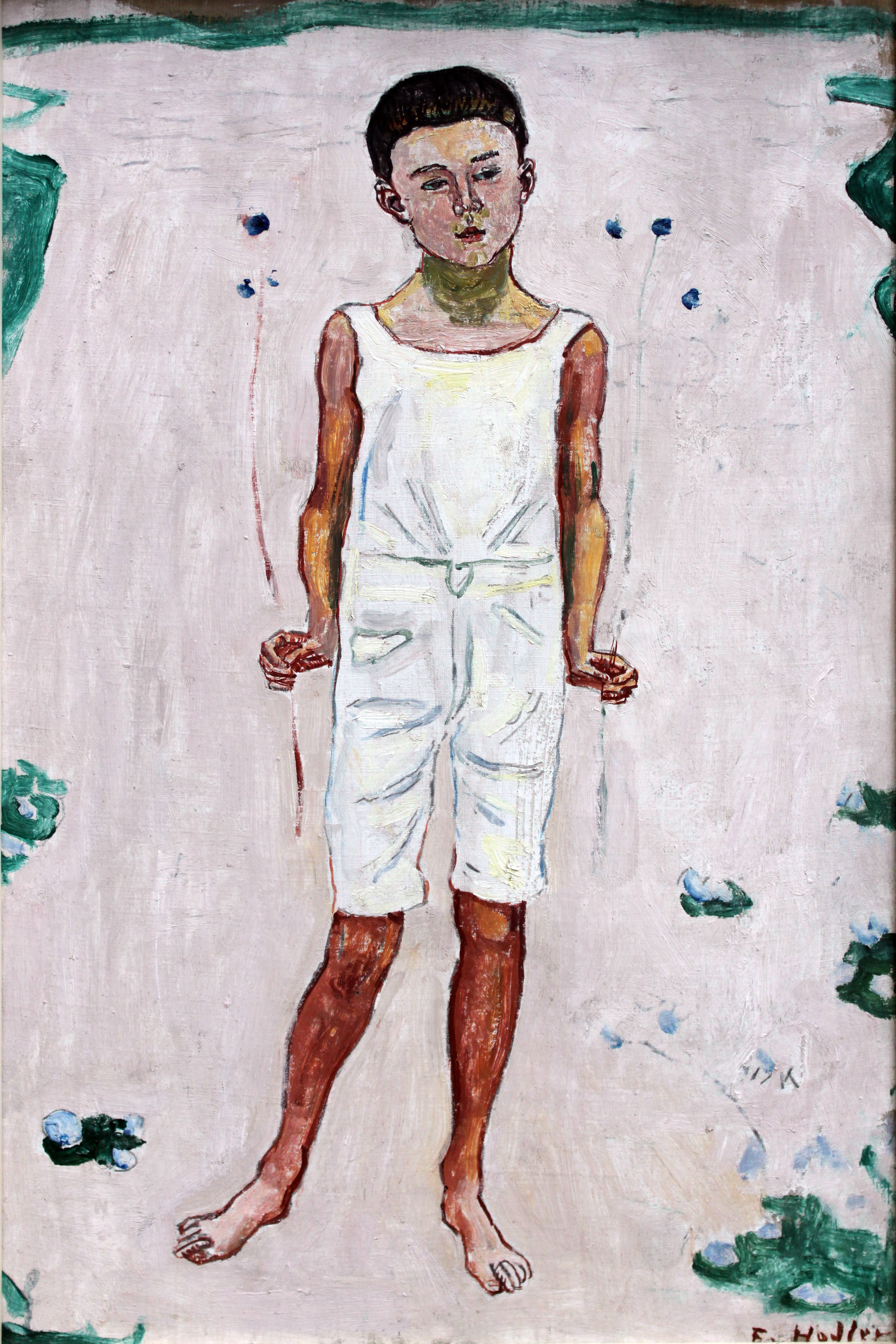 study